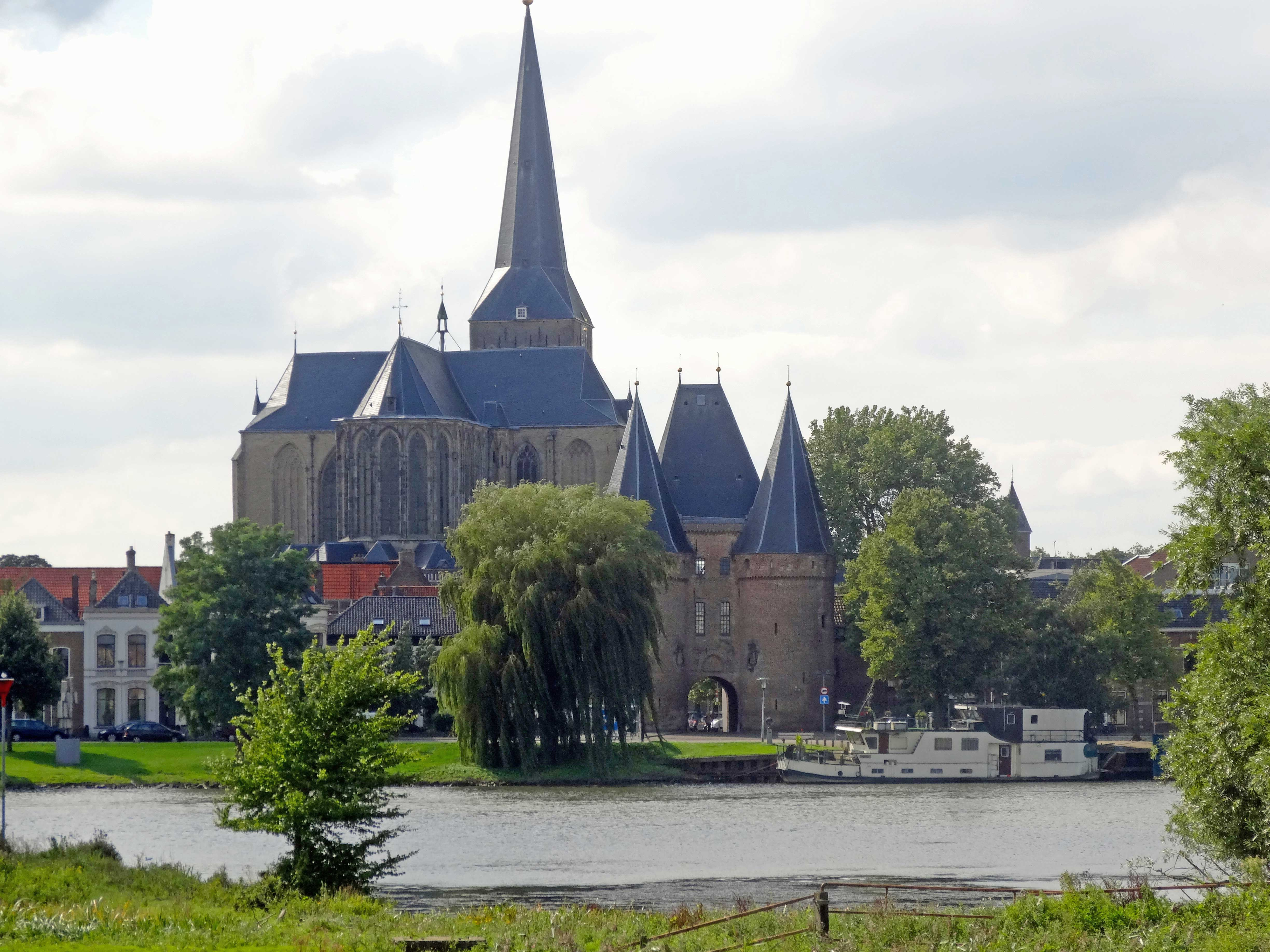 Zicht op Kampen_met Bovenkerk en Koornmarktspoort